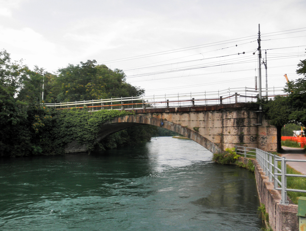 Ponte della ferrovia Milano-Venezia sul canale Muzza, presso la stazione di Cassano d'Adda.